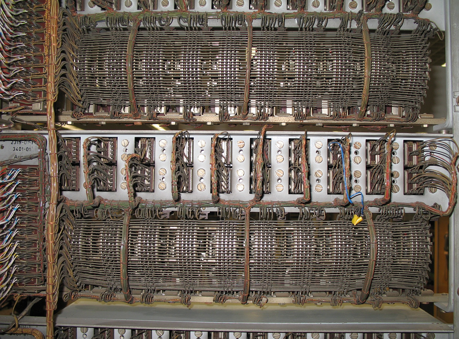 Rückseitige Verkabelung einer Drehwählerbank ( je 10 Vorwähler mit R- und T-Relais für die Teilnehmeranschlüsse) im Fernmeldemuseum Aachen